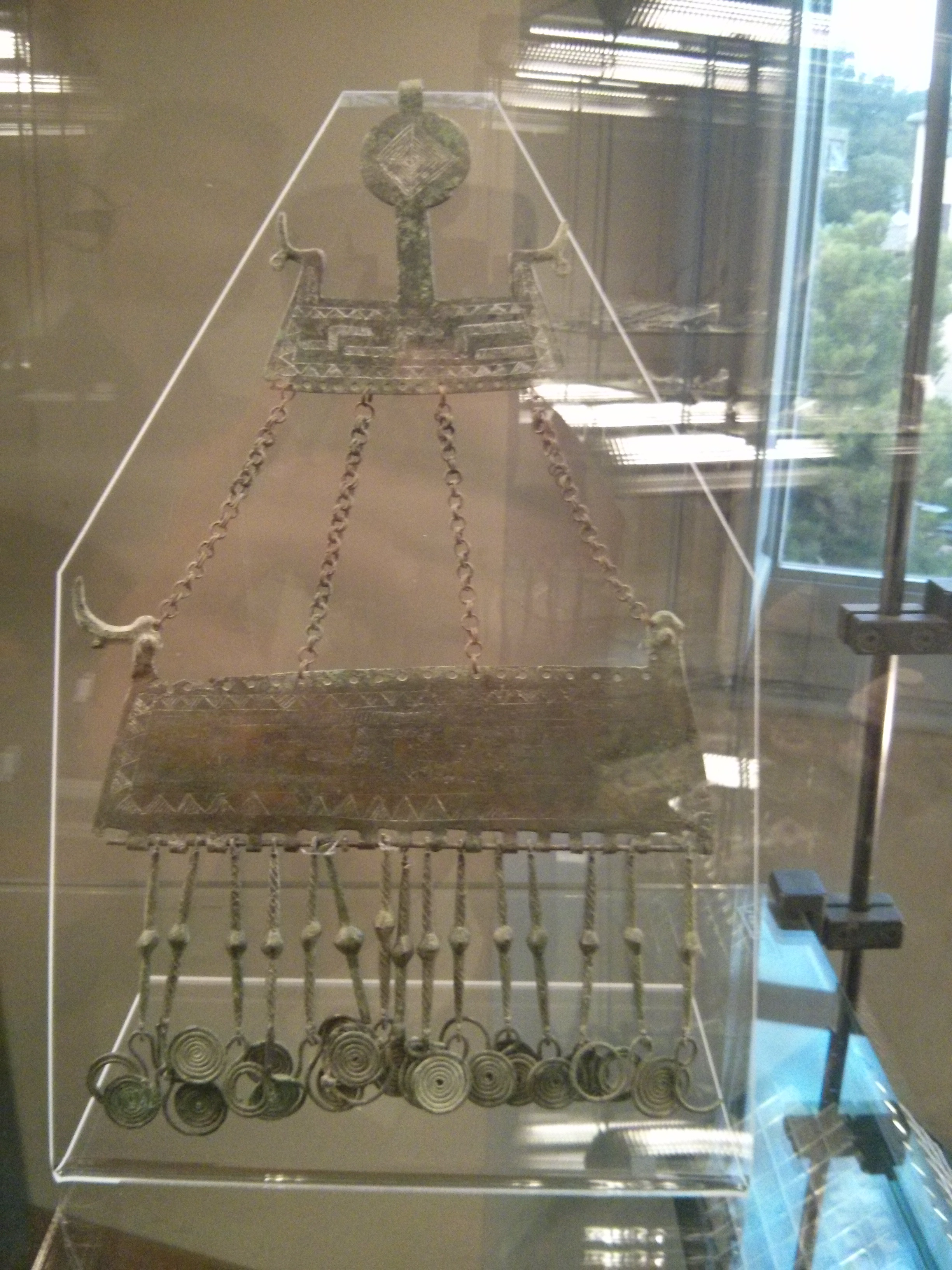 Museo Archeologico Nazionale delle Marche - MIBAC This is a photo of a monument which is part of cultural heritage of Italy.